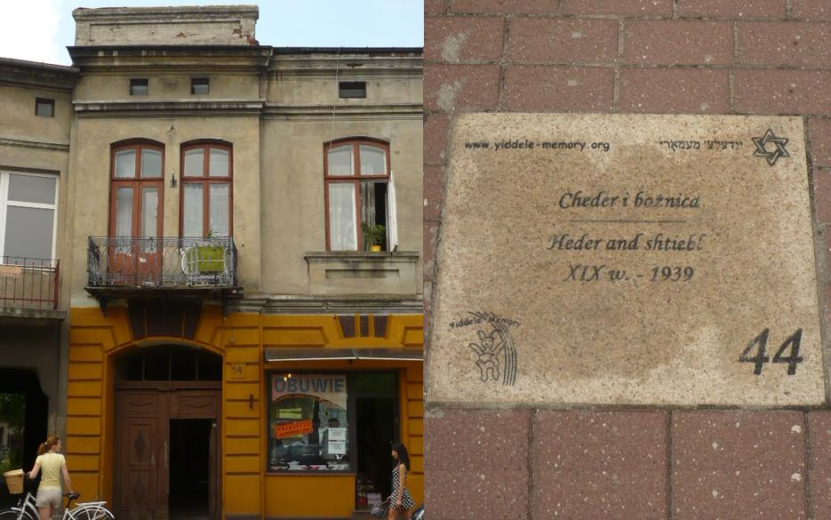 Radomsko. Otwarte Muzeum Żydowskie 44